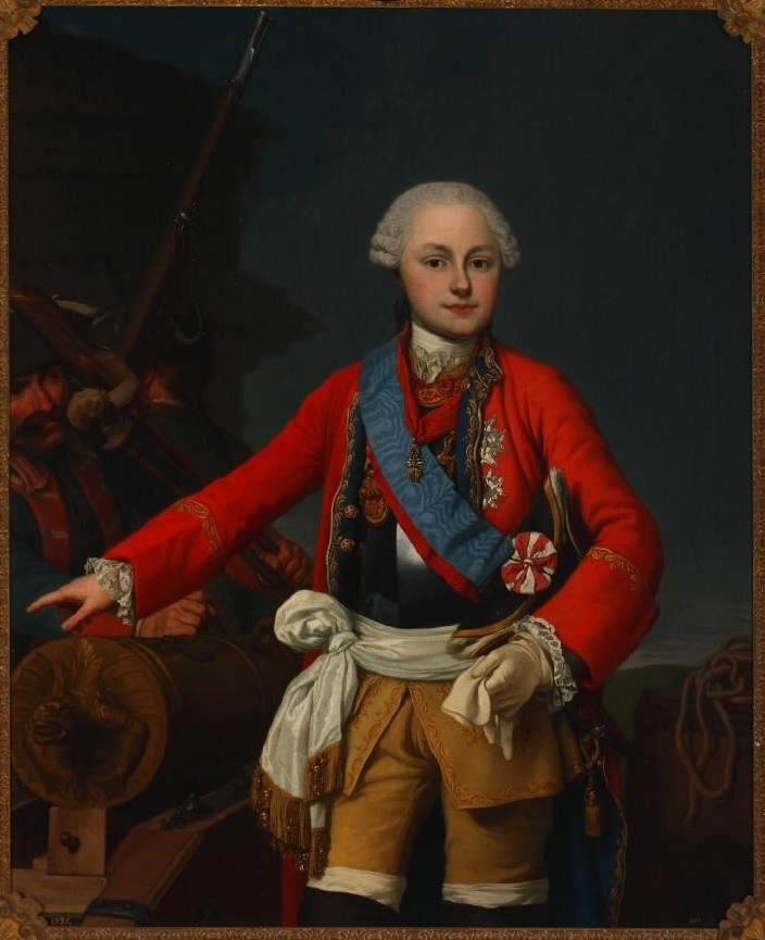 Fernando I de Borbón-Parma (1751-1802)